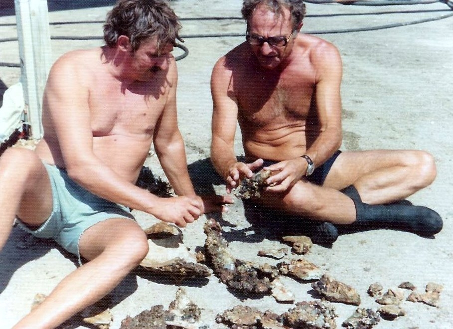 אלישע לינדר ארכאולוג ימי ישראלי יחד עם בוב מרקס